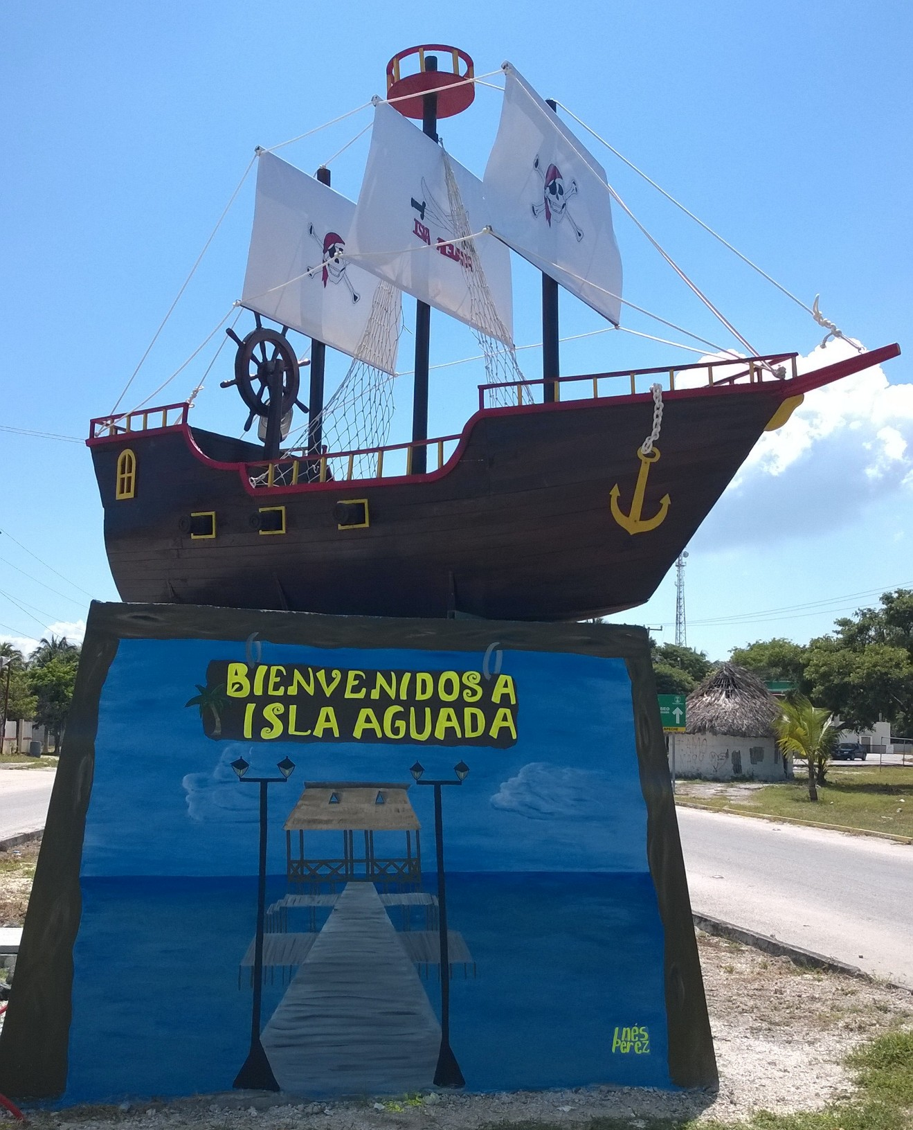 BIENVENIDOS A ISLA AGUADA